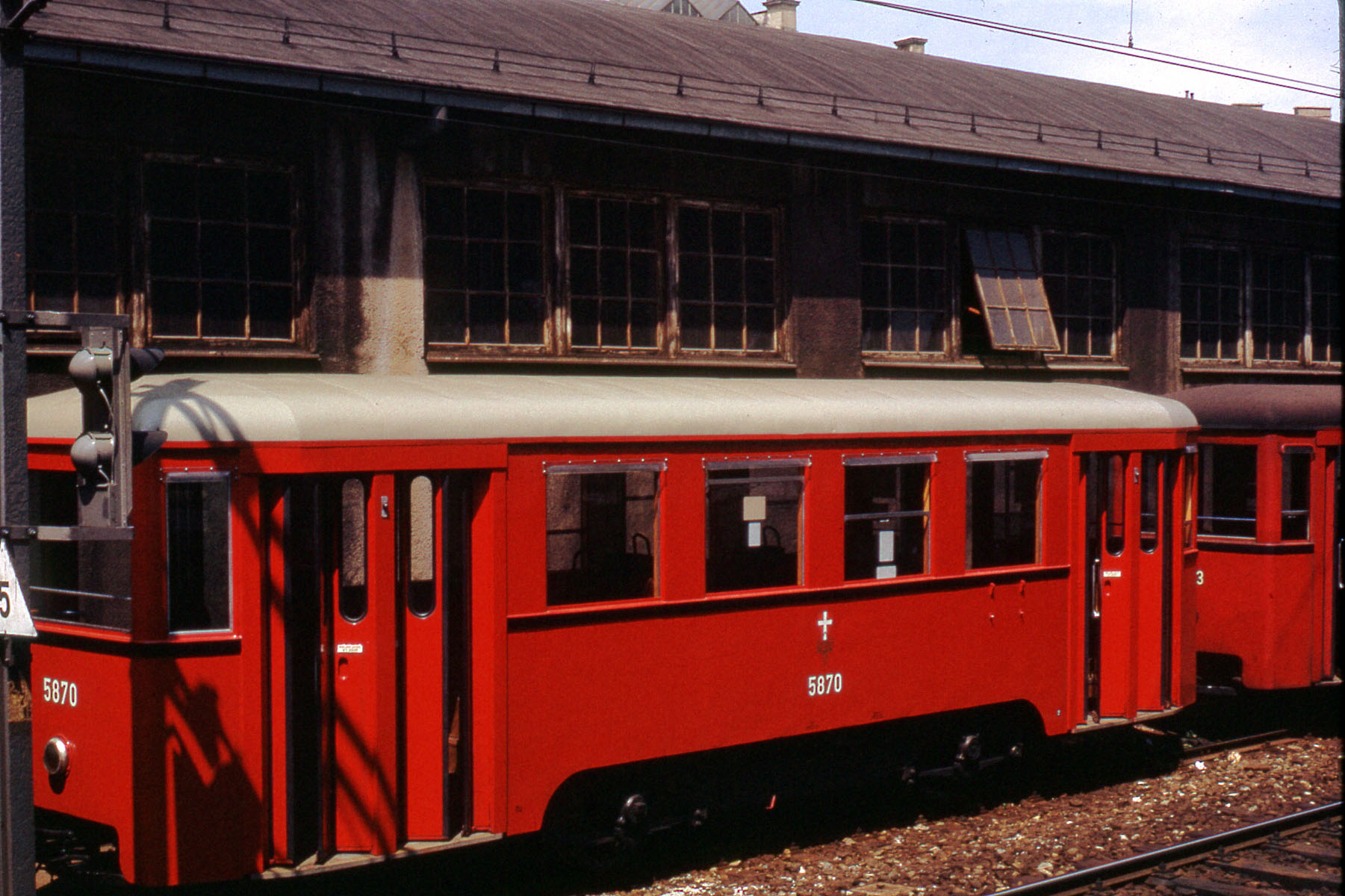 Beiwagen Type n2 im Bahnhof Michelbeuern.